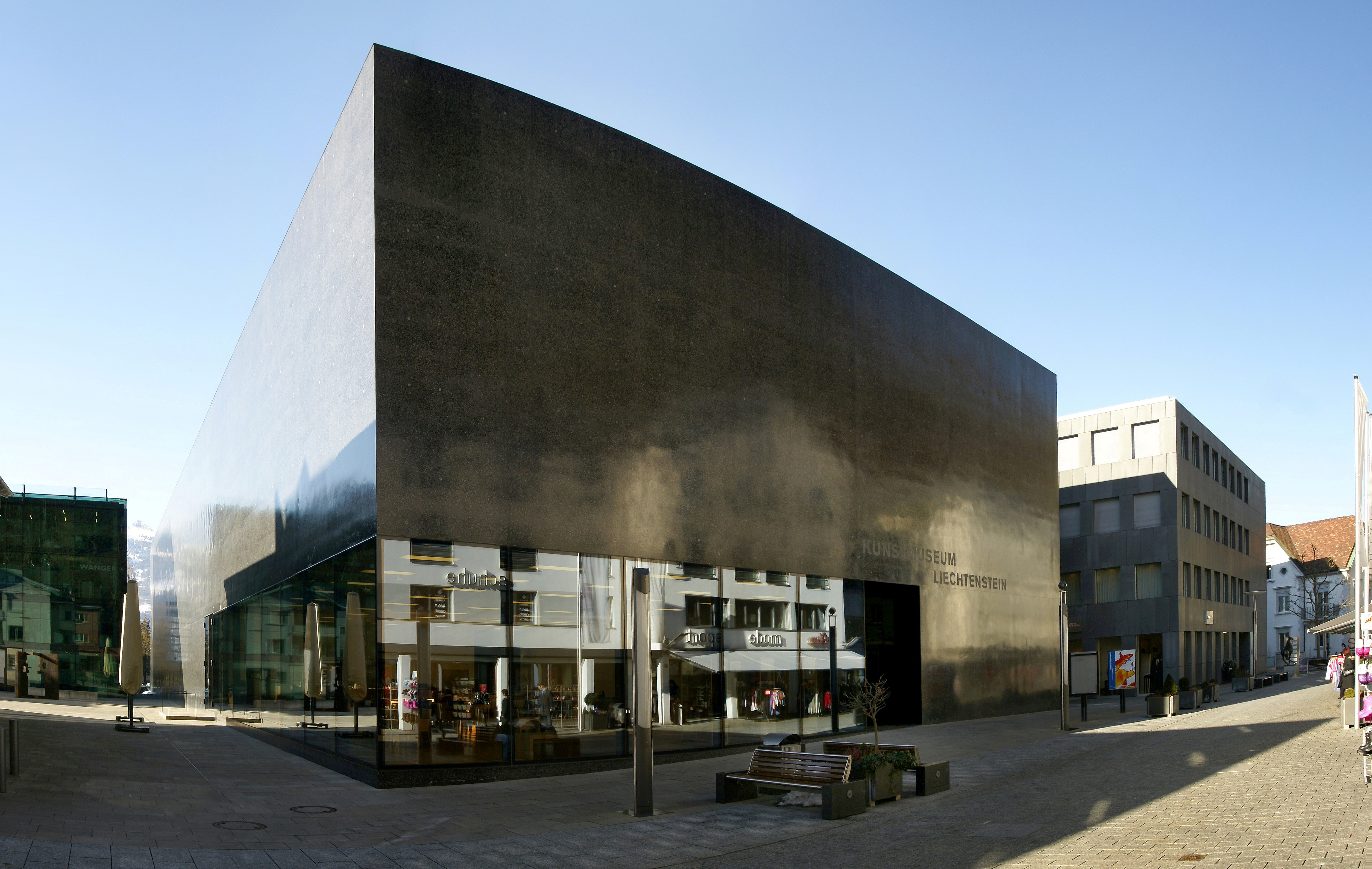 Panorama aus mehreren Bilder. Das Kunstmuseum Liechtenstein in Vaduz.